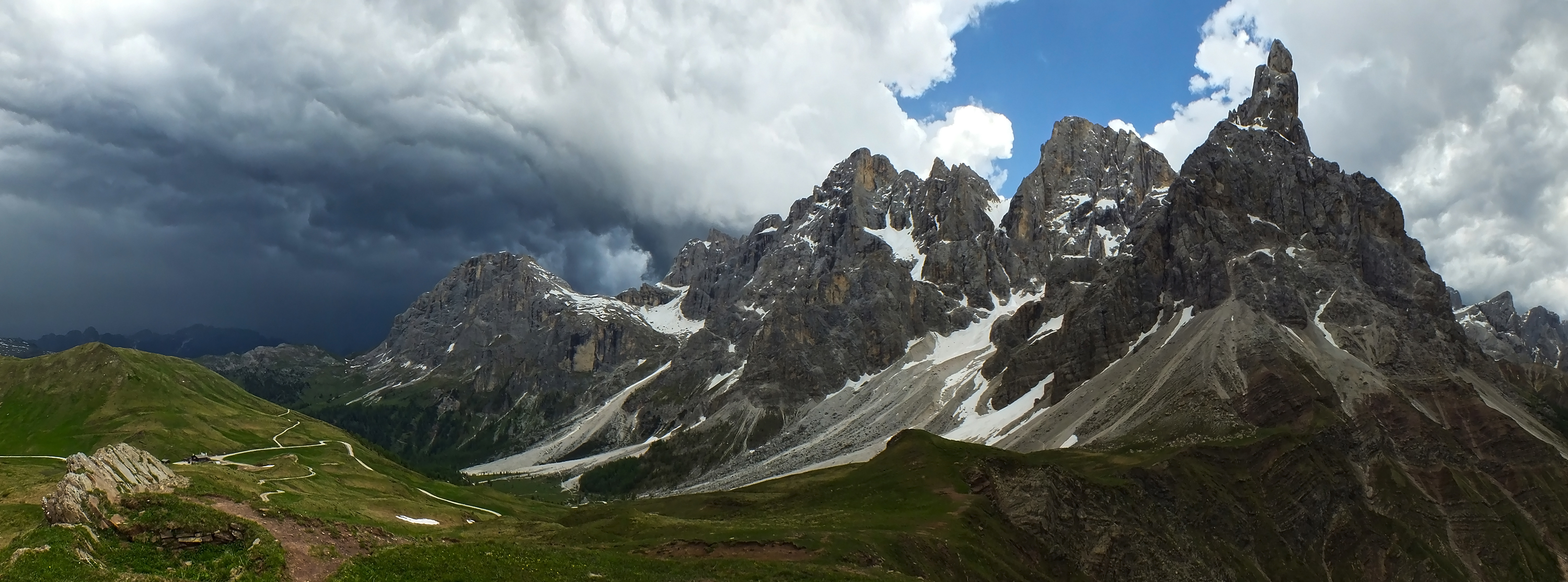 Pale di San Martino: Focobon, Pape - San Lucano, Agner - Croda Granda (Q49963040)